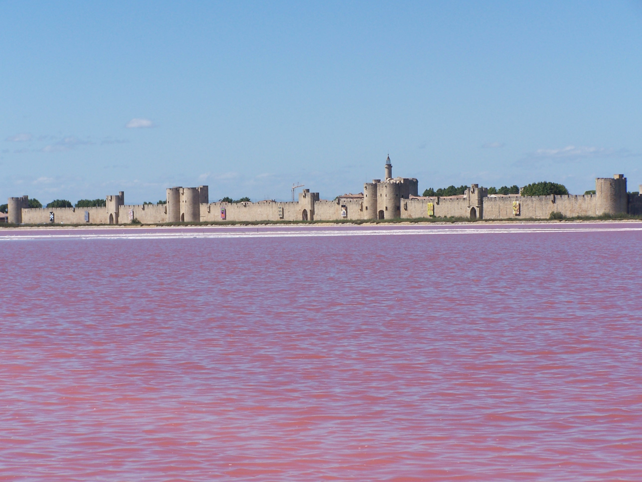 Les remparts d'Aigues-Mortes